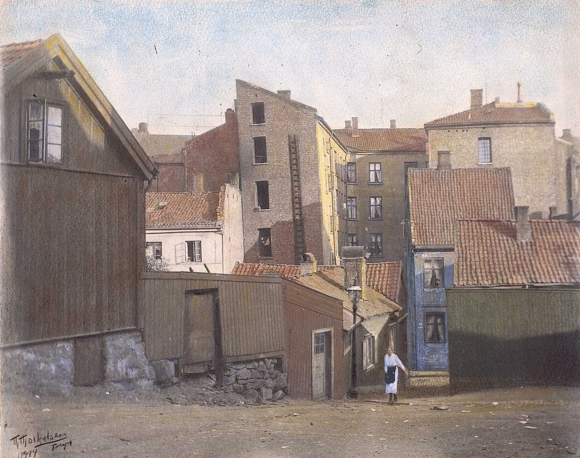 Strandbakken sett fra Bakkegaten. Foto: Thorkel Jens Thorkelsen/Oslo Museum, 1914.